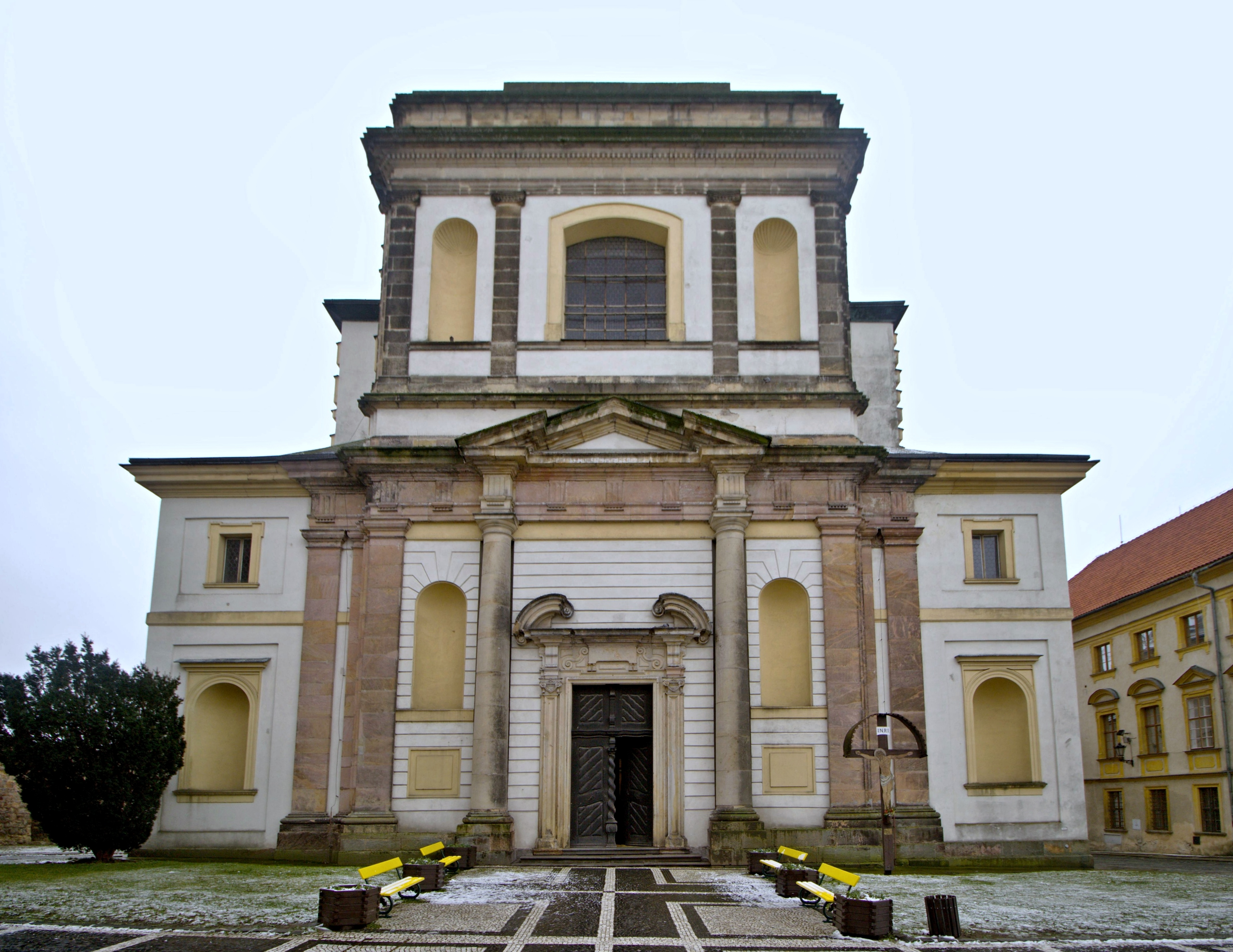 Jičín farní a děkanský kostel svatého Jakuba Většího